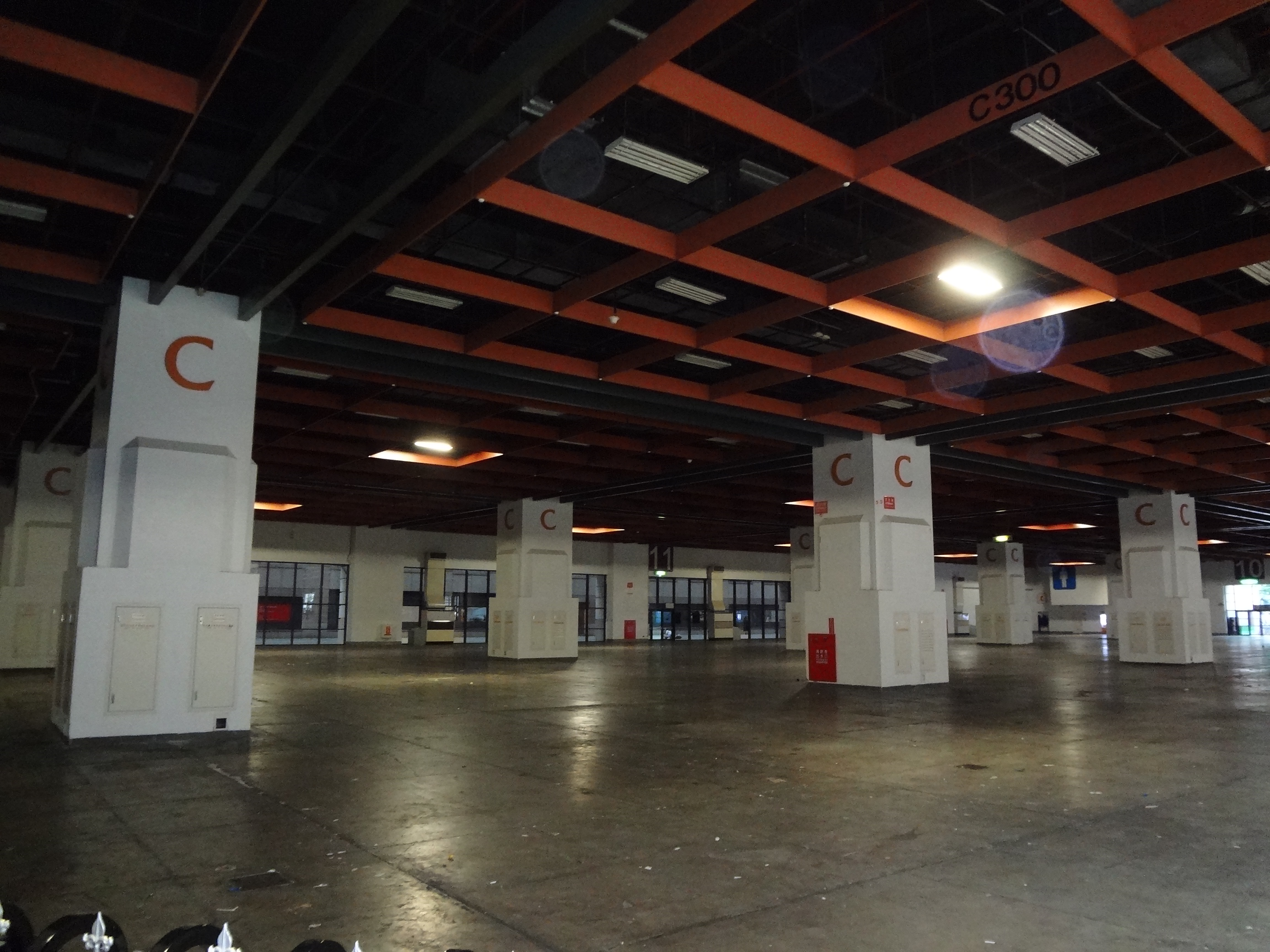 中文（台灣）: 台北世界貿易中心展覽大樓1樓展場C區，拍攝時無展覽。